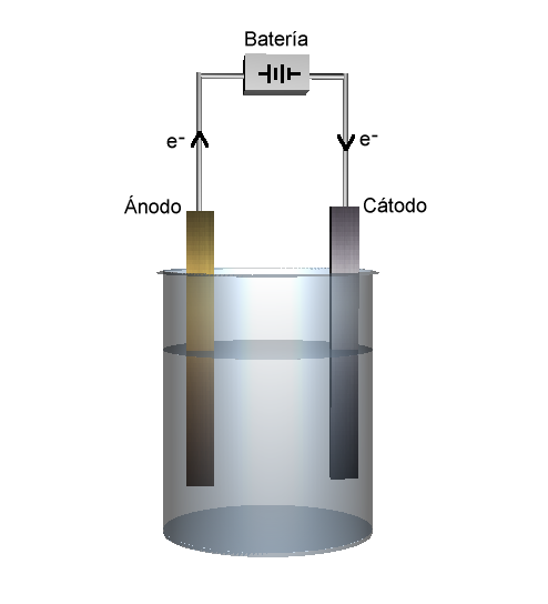 Imagen del proceso de electrólisis. Esta imagen fue cedida al dominio público por el autor (Miguel Barousse Ordóñez). mbarousse (discusión)